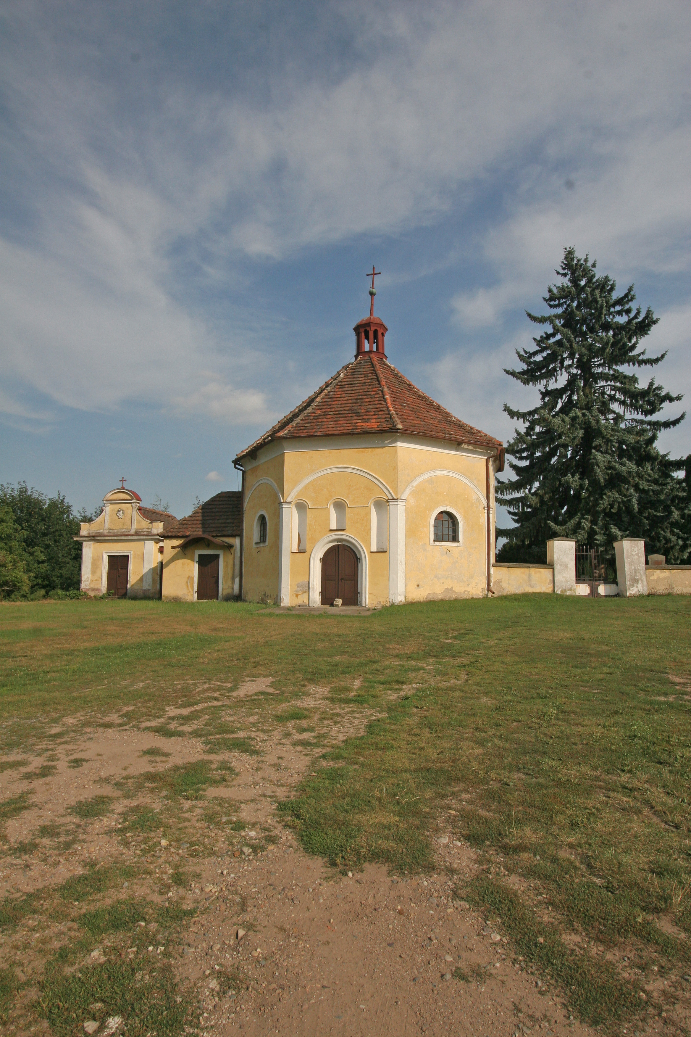 Kaple svatého Huberta, nad vsí, Starý Ples.